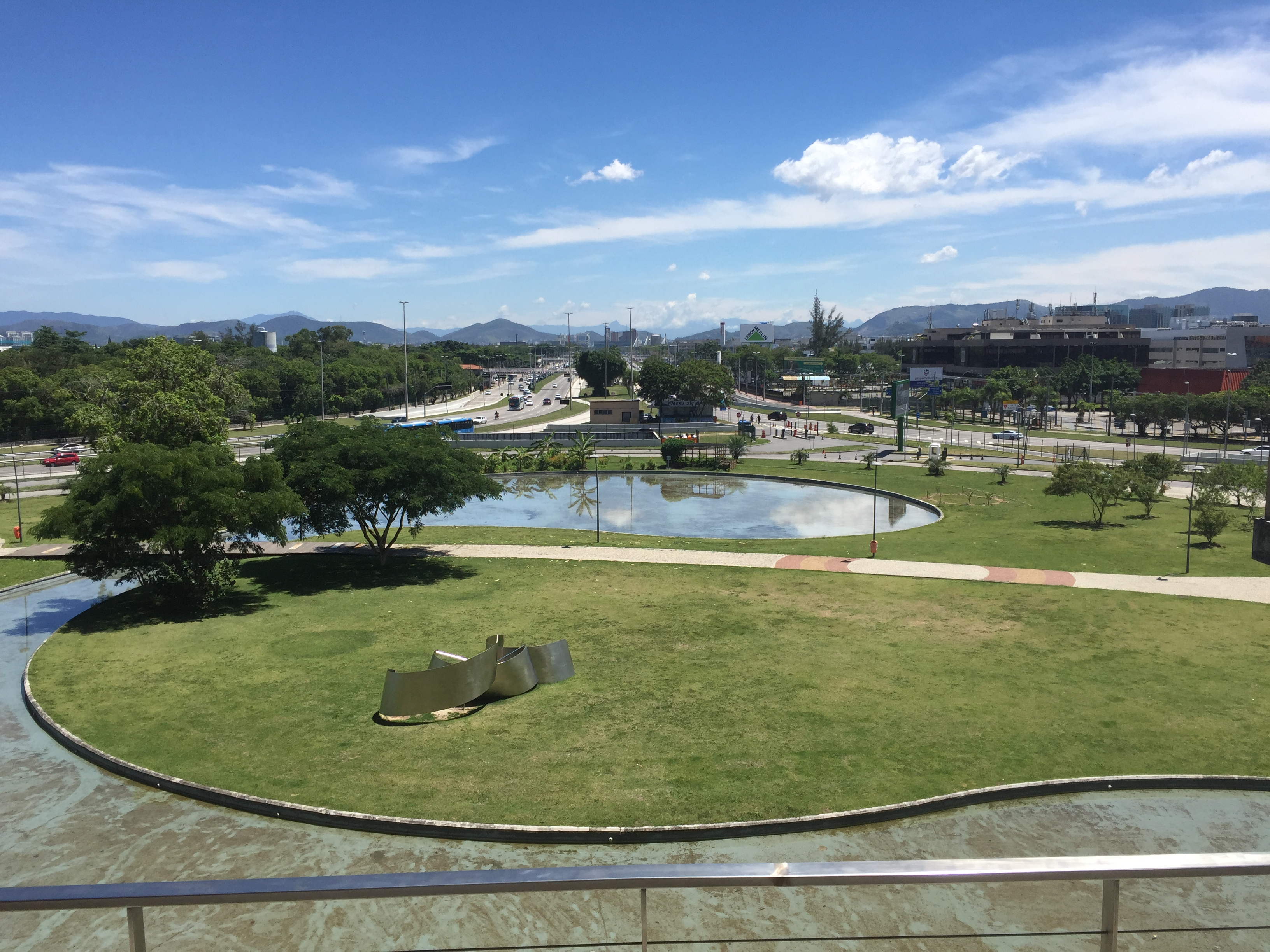 Vista da Cidade das Artes